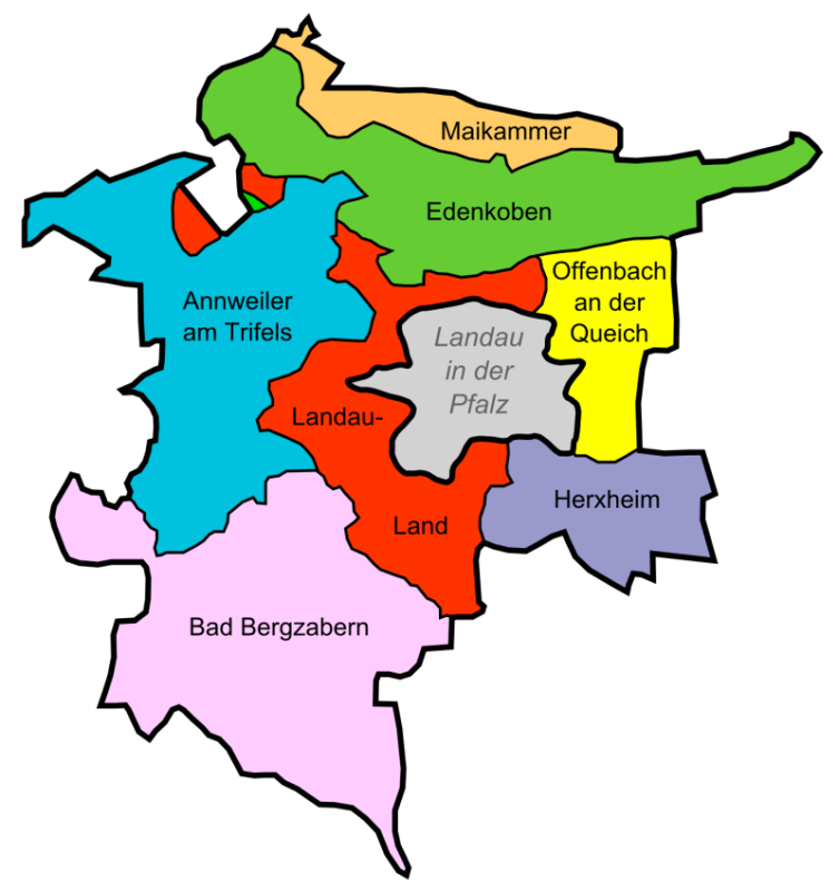 Verbandsgemeinden im Landkreis Südliche Weinstraße in Deutschland